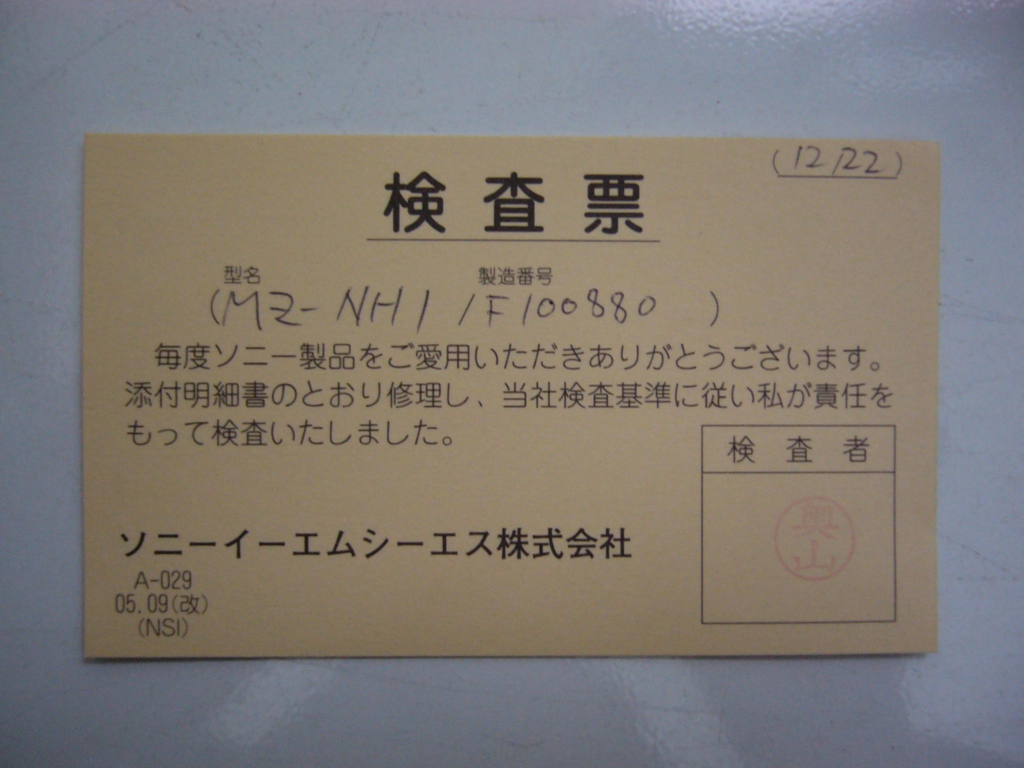 Sony EMCS公司開出的Sony Hi-MD隨身聽MZ-NH1維修檢查票正面